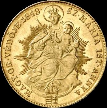 dukát 1848 - reverse